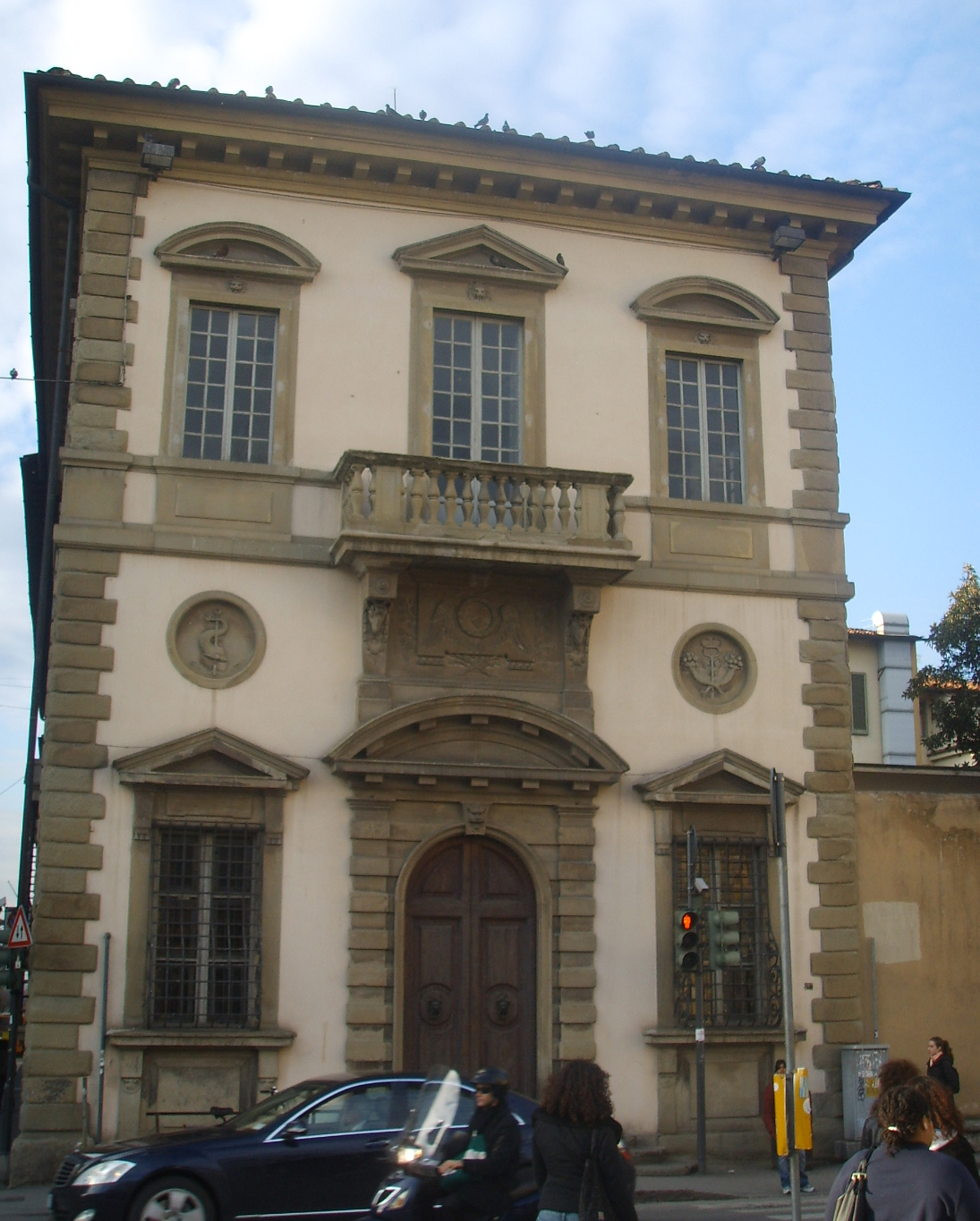 Palazzina_della_Livia palace in Florence